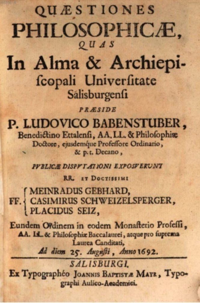 Dissertation Babenstuber mit Nennung Schweizelsperger, Salzburg 1692